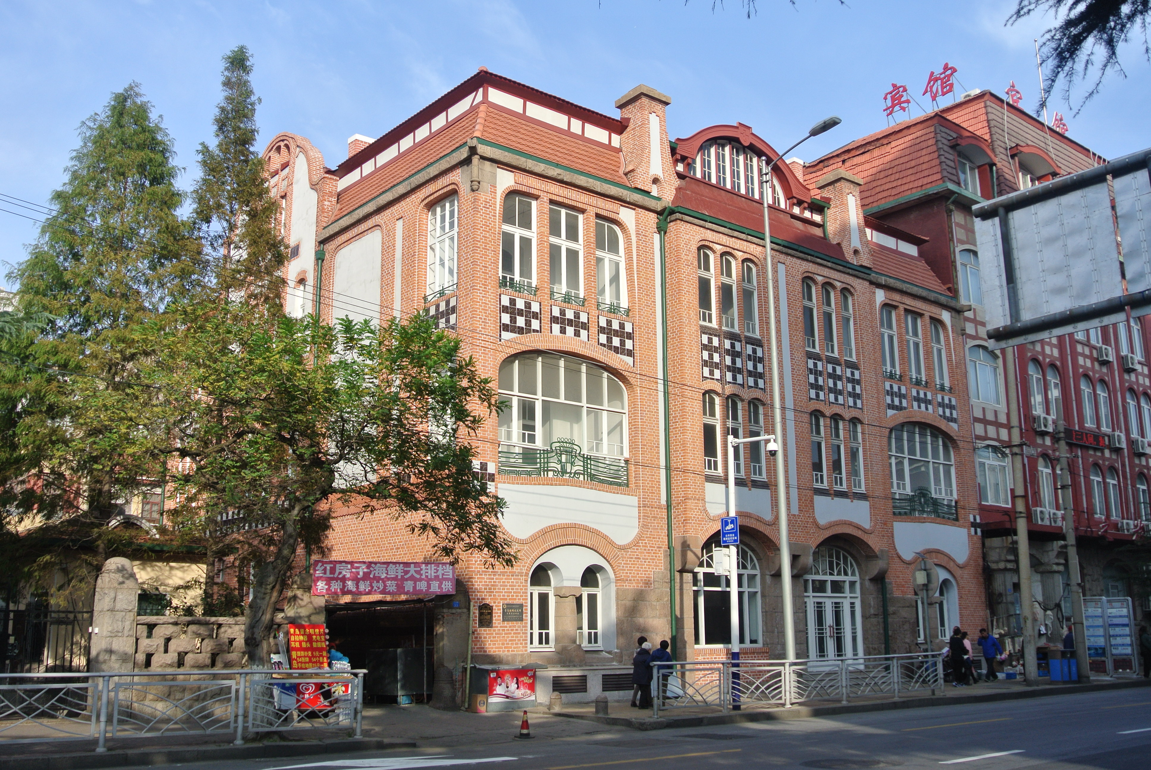 青岛赉寿药房旧址，也称拉尔茨药店旧址、医药商店旧址。位于青岛广西路。